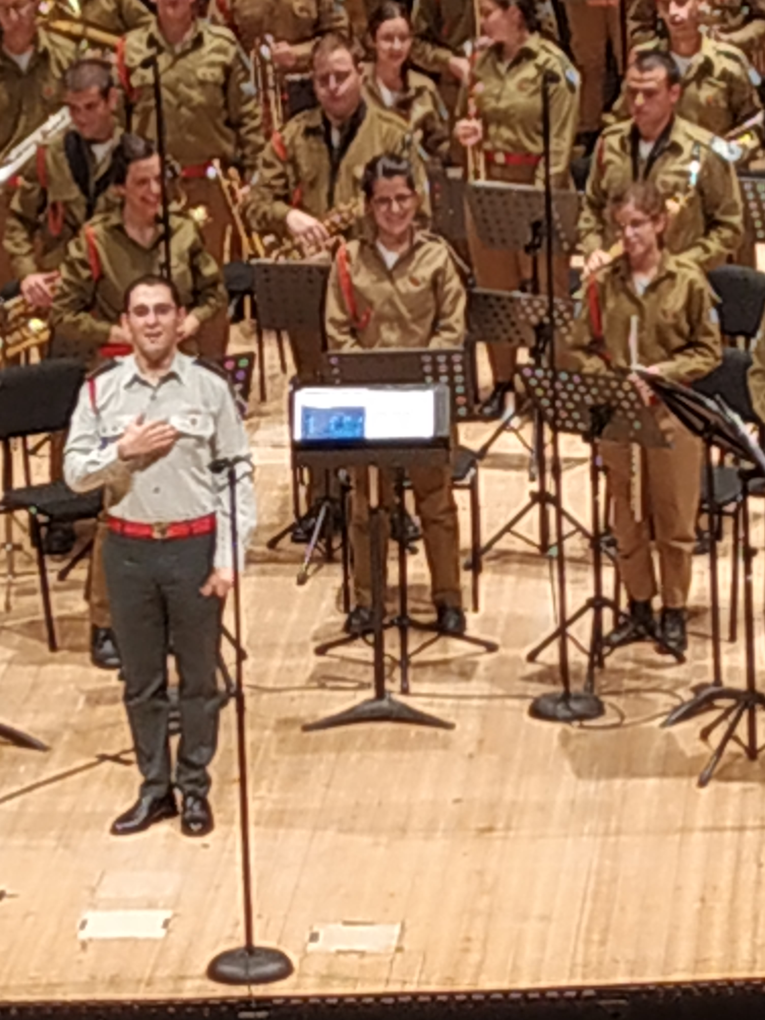 סרן רום שמיר, המנצח של תזמורת צה"ל